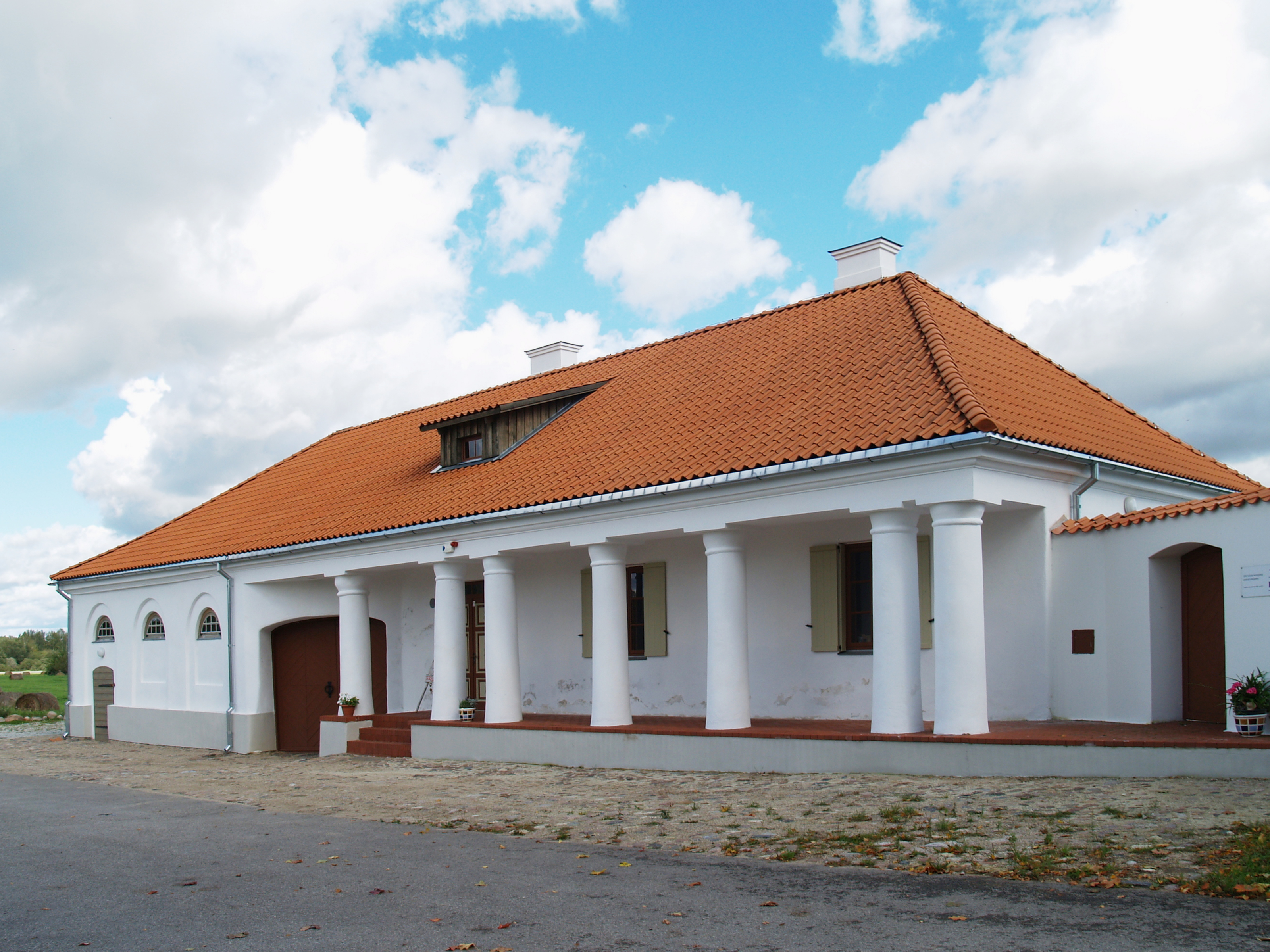 Uhti kõrtsihoone